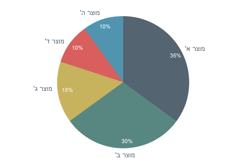 גרף עוגה מציג את השלם (100%), את החלקים של השלם, יחס החלק לשלם, יחס בין החלקים של השלם, תרומת החלק לשלם